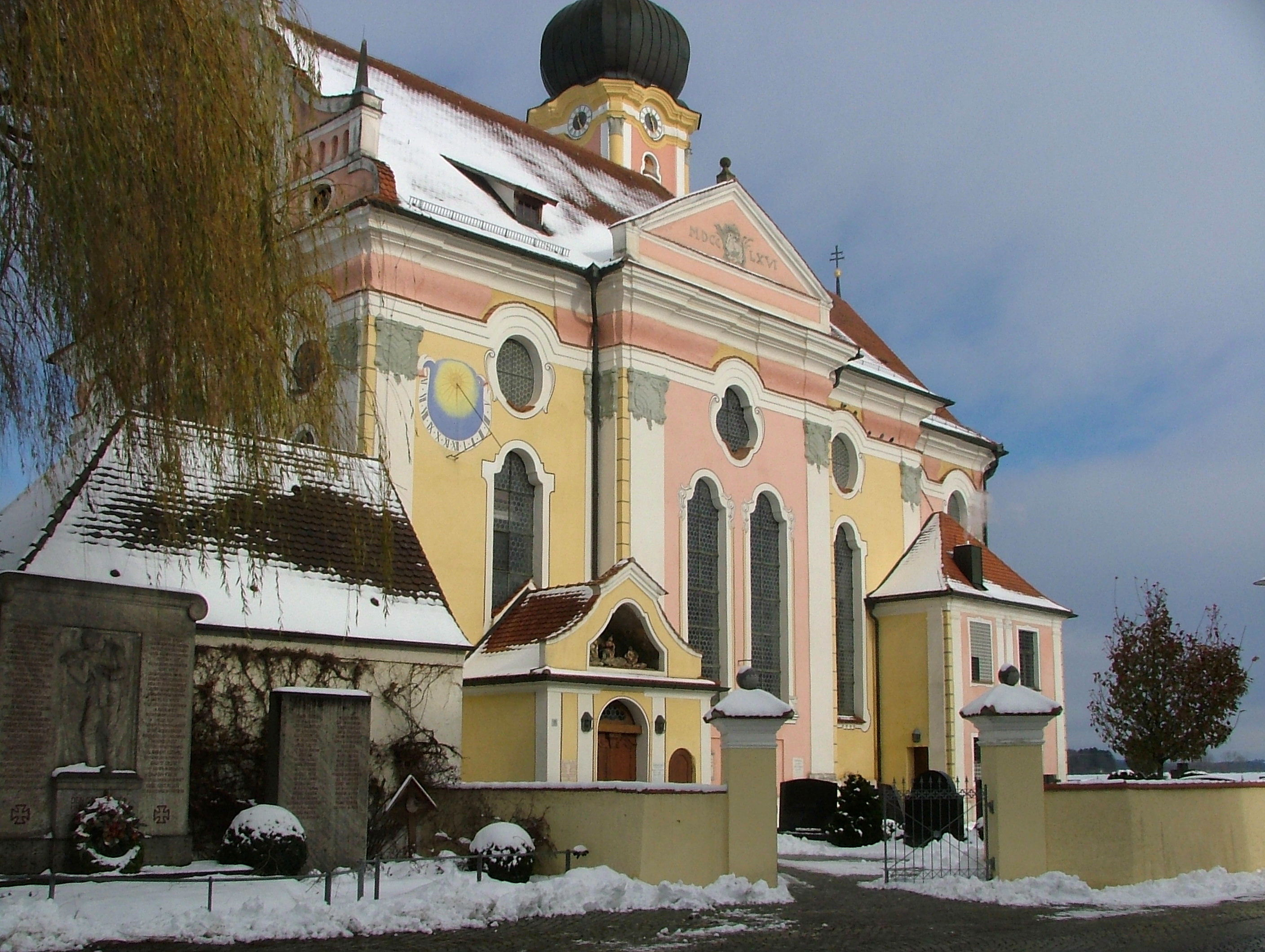 Kirche